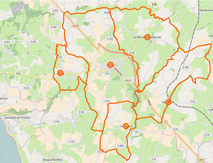 Carte de la commune nouvelle et ses communes déléguées